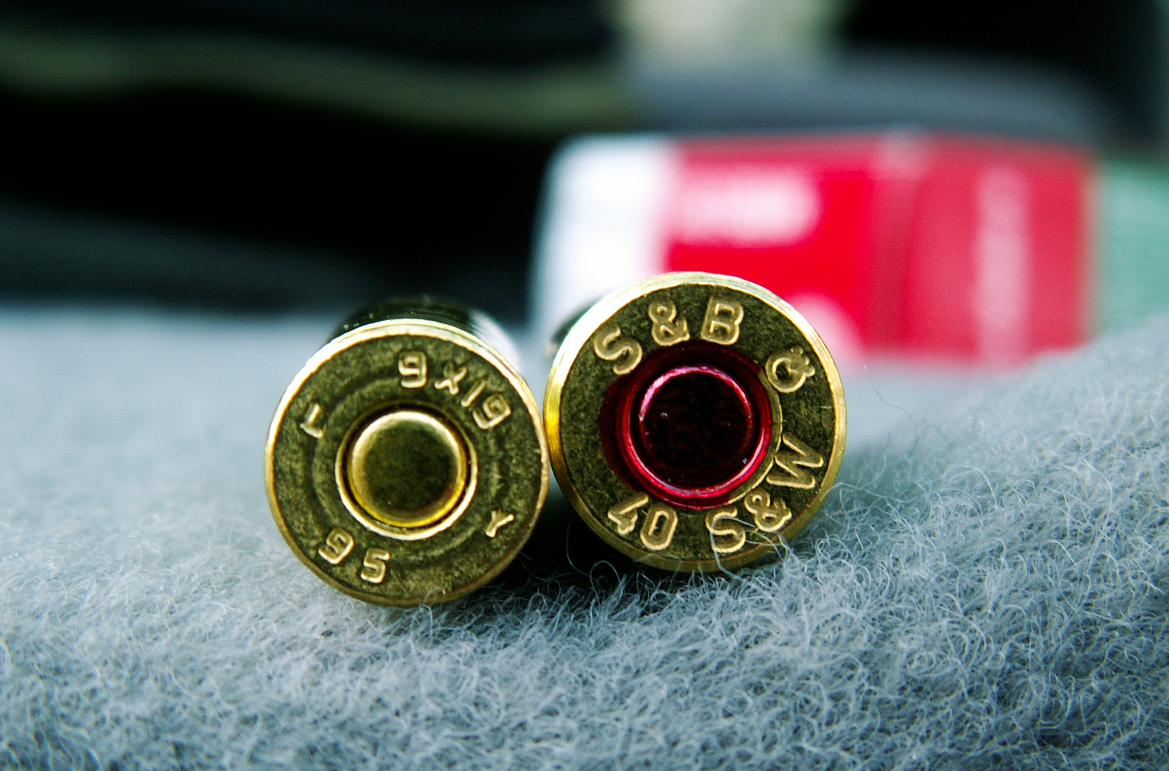 Napisa na tulcih nabojev 9x19 in .40 s&w.